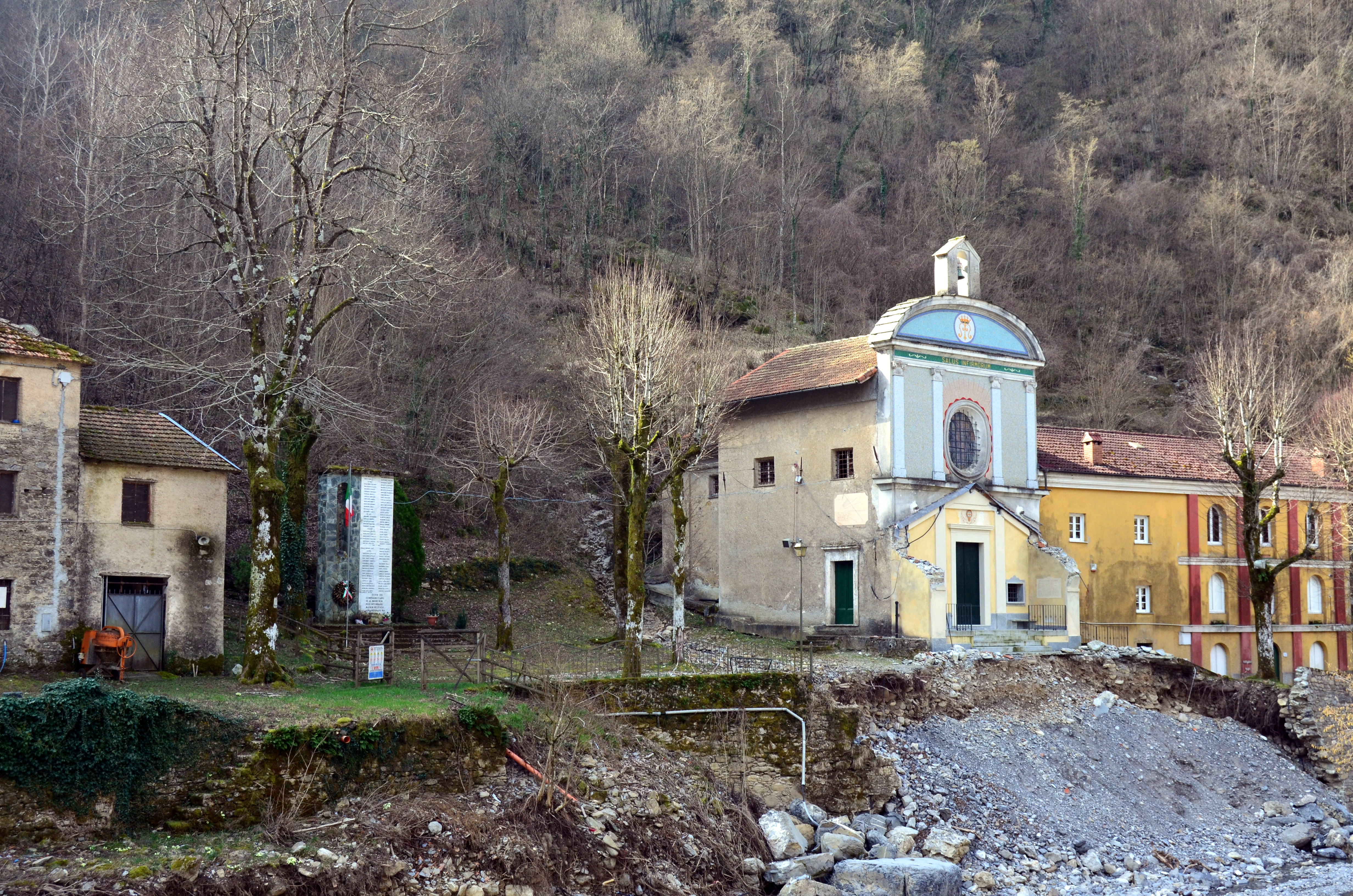 I danni causati da una frana prospiciente l'ingresso del santuario della Madonna dell'Acqua, Valbrevenna, Liguria, Italia